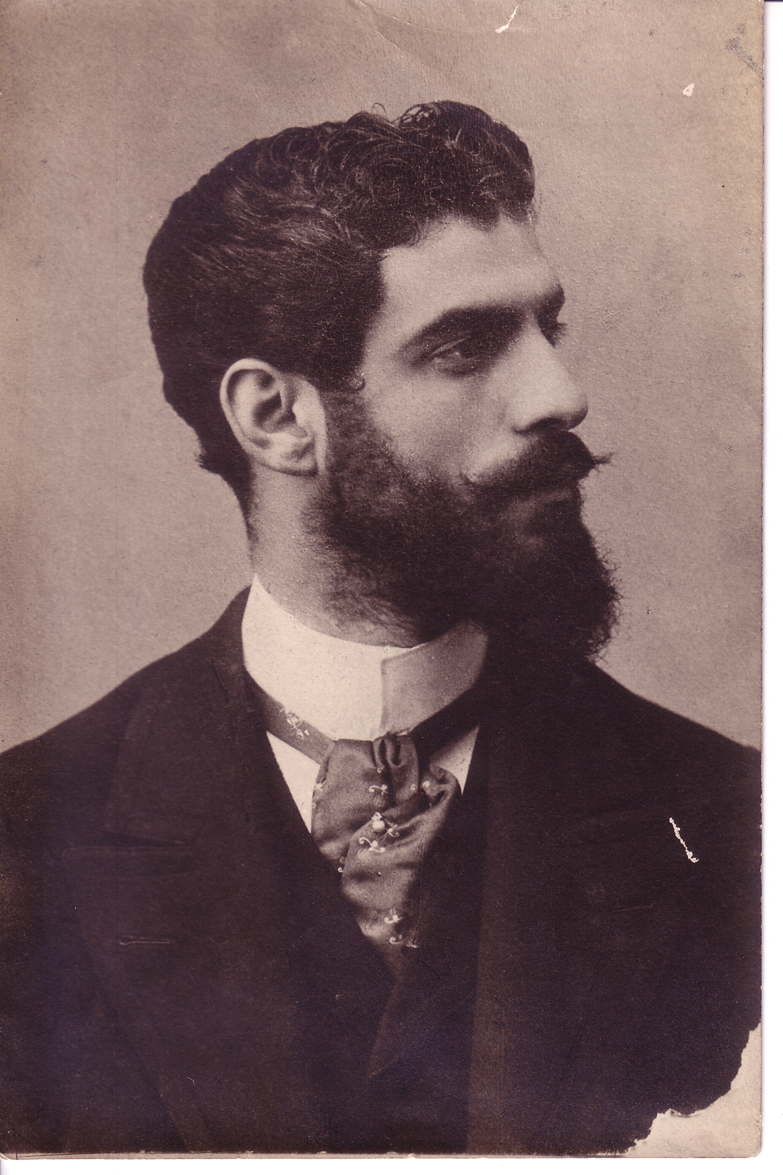 Fotografia de Rafael Romero de Torres de la colección fotografica de la familia Romero de Torres.